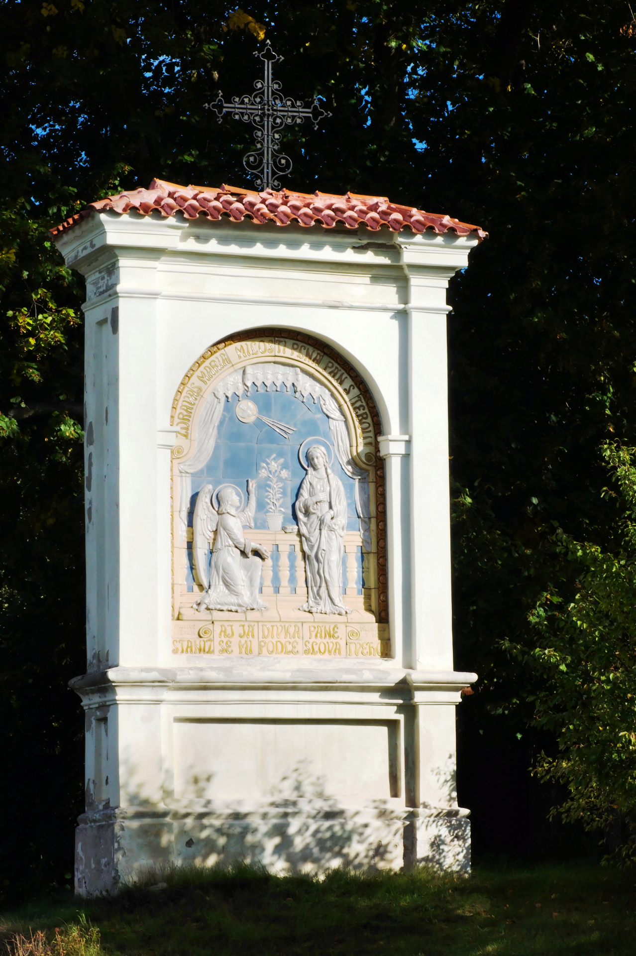 Křížová cesta z Březnice na Svatou Horu, z toho jen: kaplička II., při silnici, Březnice